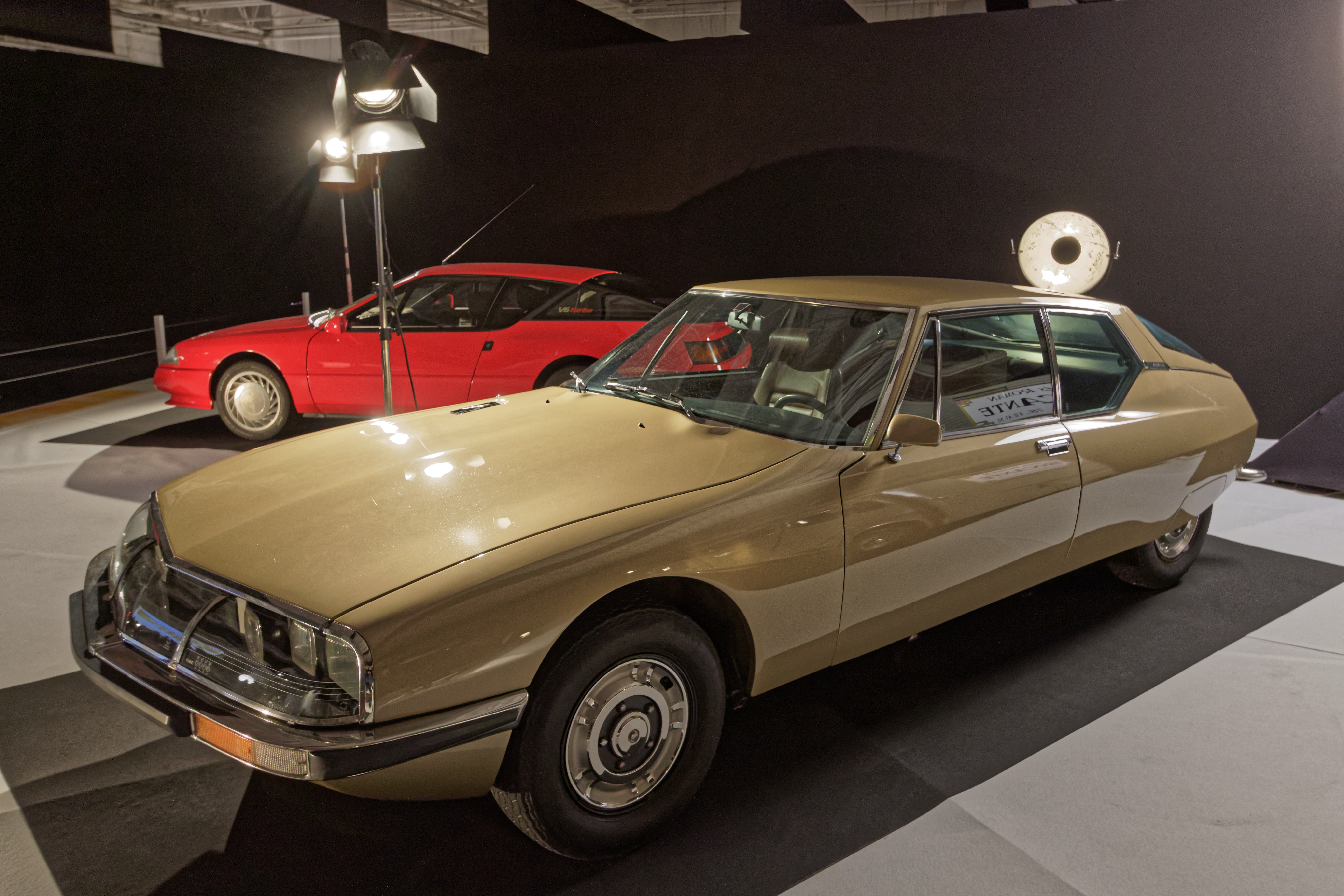 Une Citroën SM de 1969 présentée lors du mondial de l'automobile de Paris 2016. Ce modèle de véhicule a été utilisé sur le tournage du film César et Rosalie'.